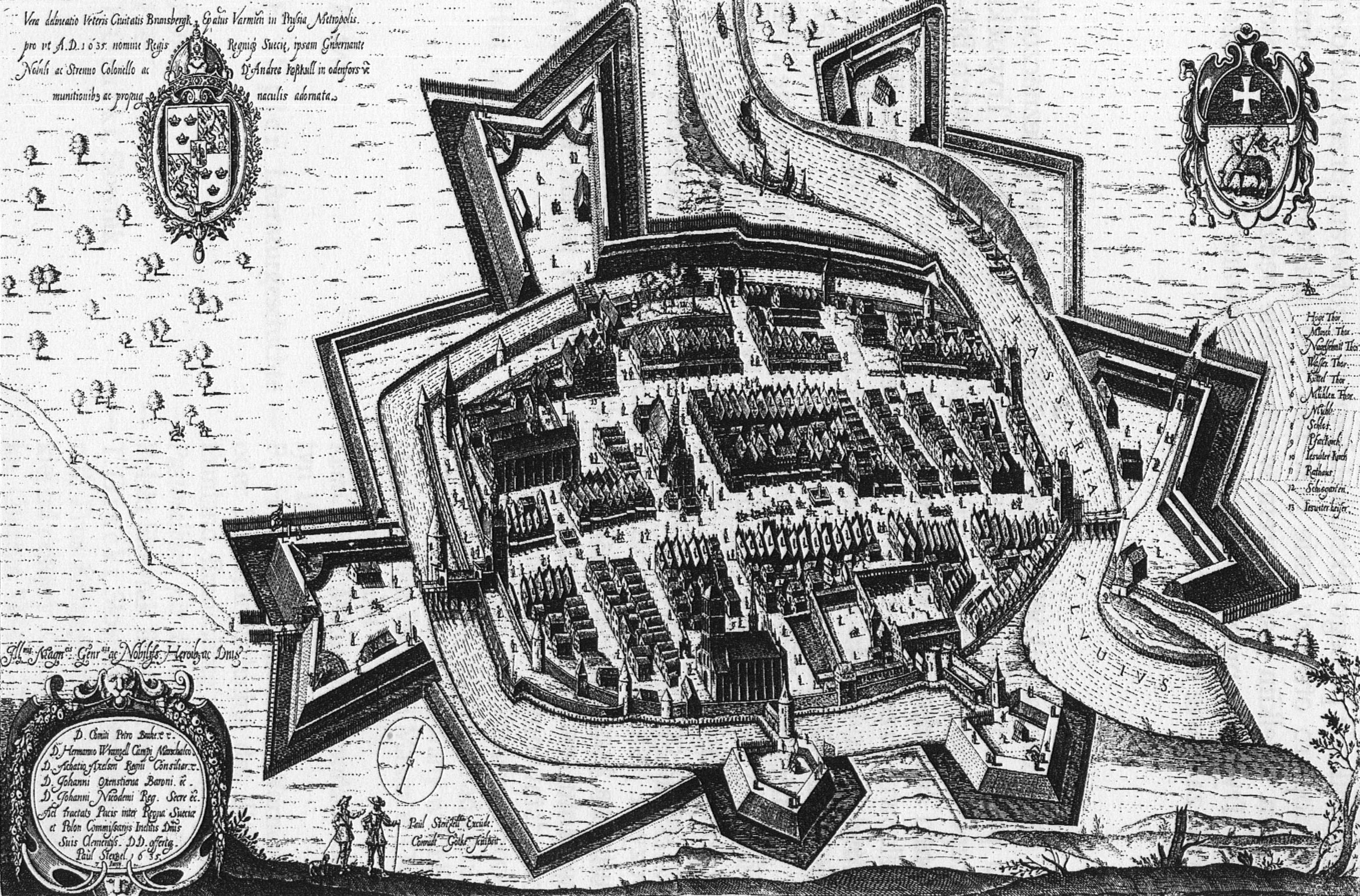 Miedzioryt Braniewa z 1635 roku, autorzy: Paul Stertzel, Conrad Götke